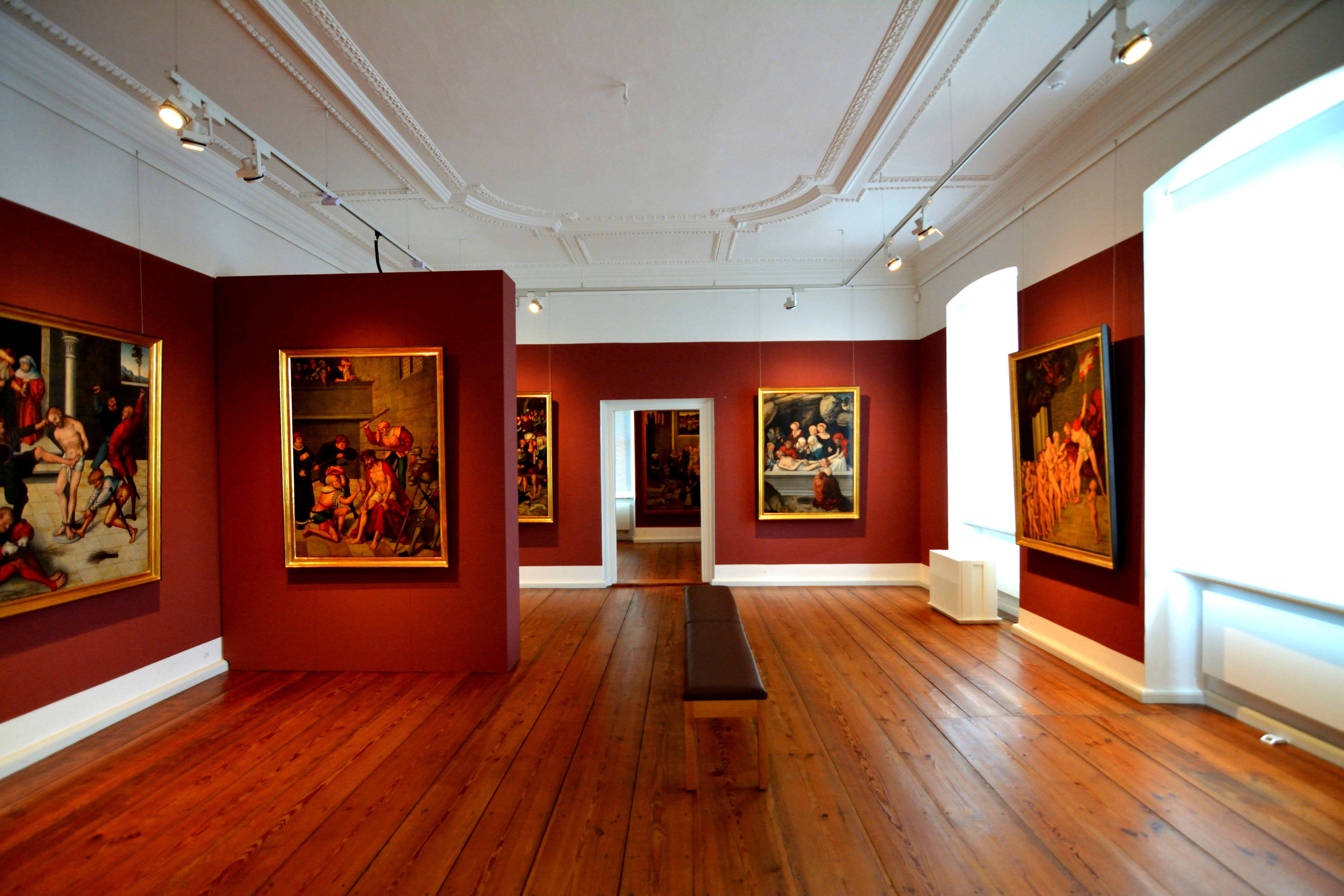 Einer der Räume im ersten Stock mit Bildern von Cranach.